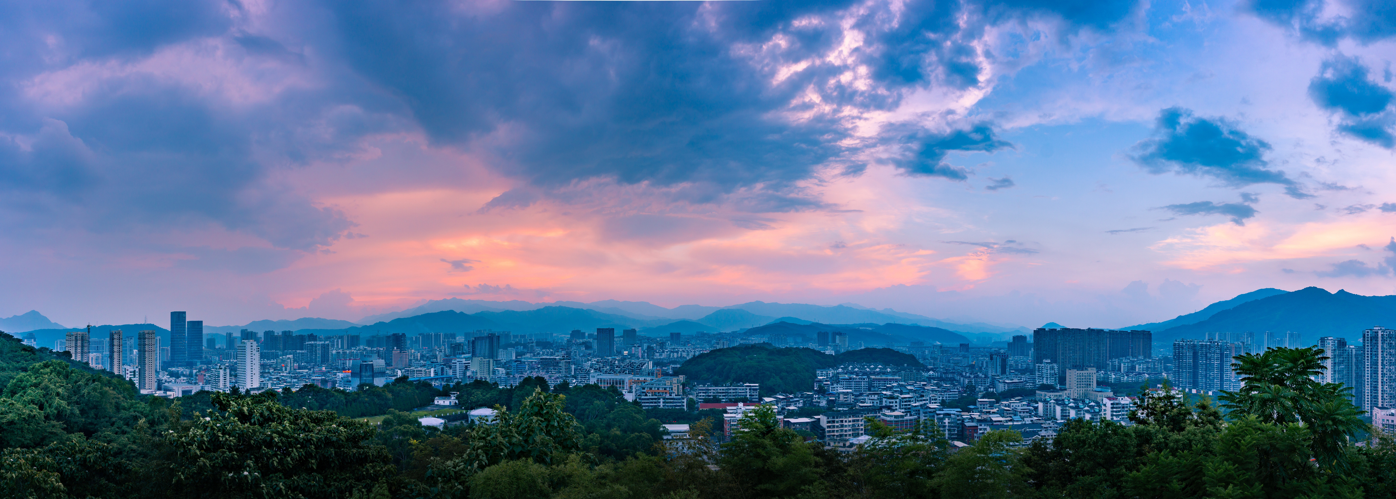 龙岩市城区全景（于莲花山观望）